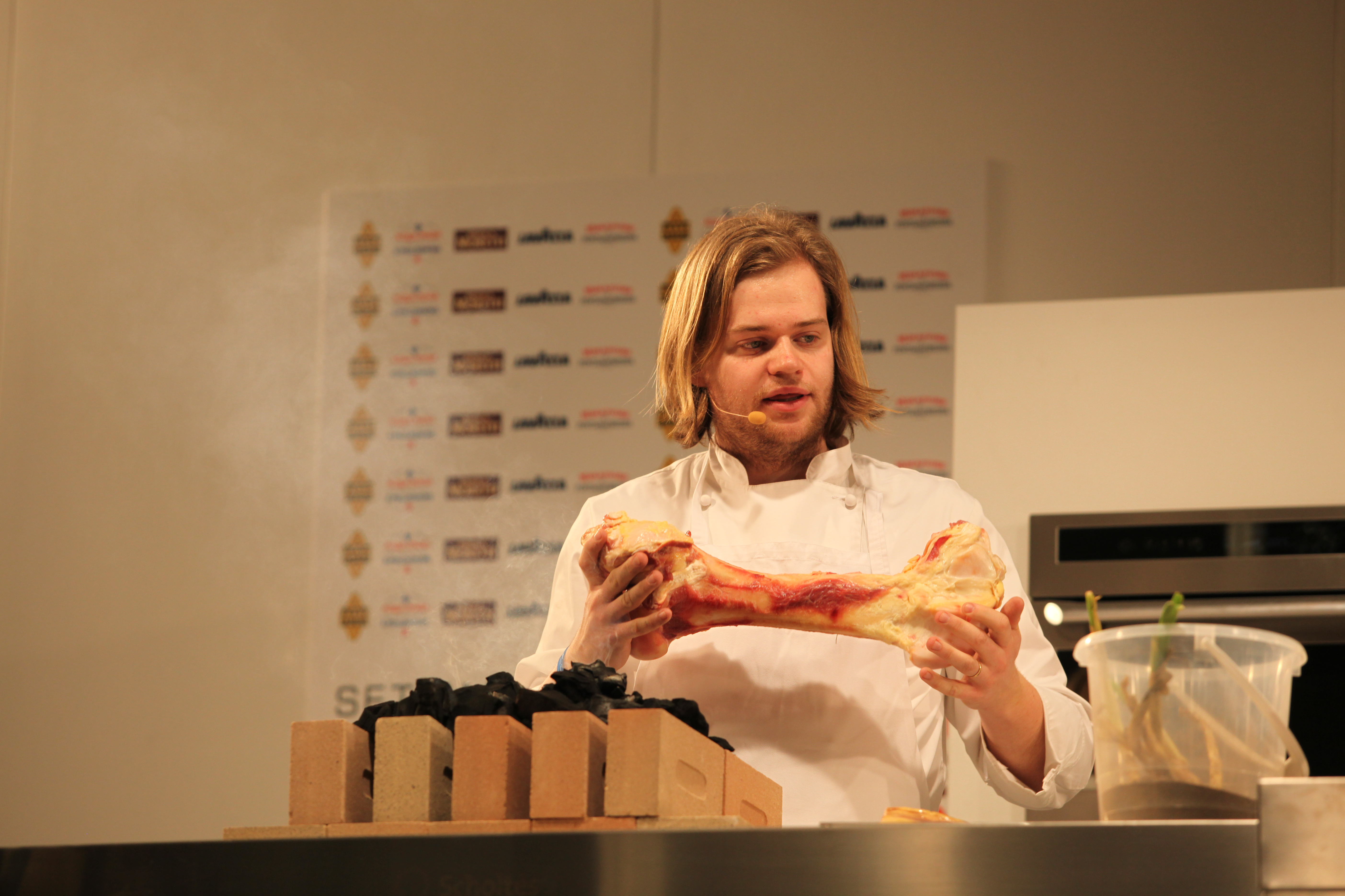 Magnus Nilsson e la scelta del giusto metodo di conservazione delle verdure come mezzo per valorizzarle IDENTITA' GOLOSE: Congresso italiano di cucina d'autore Settima Edizione 30 Gennaio - 1 Febbraio 2011 "Il Lusso della semplicità: i segni e i gesti": un volere capire cosa rimane di immutato, di chiaro e di preciso nel tempo in una ricetta, quei segni e quei gesti che caratterizzano anche il più creativo dei cuochi. Come non esiste una tradizione ferma e immutata, così non esiste un cambiamento nuovo al 100 per cento. C’è sempre del movimento nella prima e del noto nella seconda, solo che in un caso è troppo lento per essere percepito dai più e nell’altro è troppo rapido al punto da nascondere gli elementi di continuità. "The luxury of simplicity: the signs and gestures": a will to understand what remains unchanged, clear and defined with time in a recipe, those signs and gestures which characterize even the most creative among chefs. As there is no still and unchanged tradition so there is no 100 per cent new change. There is always movement in the first and something known in the second, it’s only that in the first case it’s too slow to be perceived by the majority of people and in the second it’s too fast, so much that it hides the elements of continuity. In Milan, we are going to search for these details.